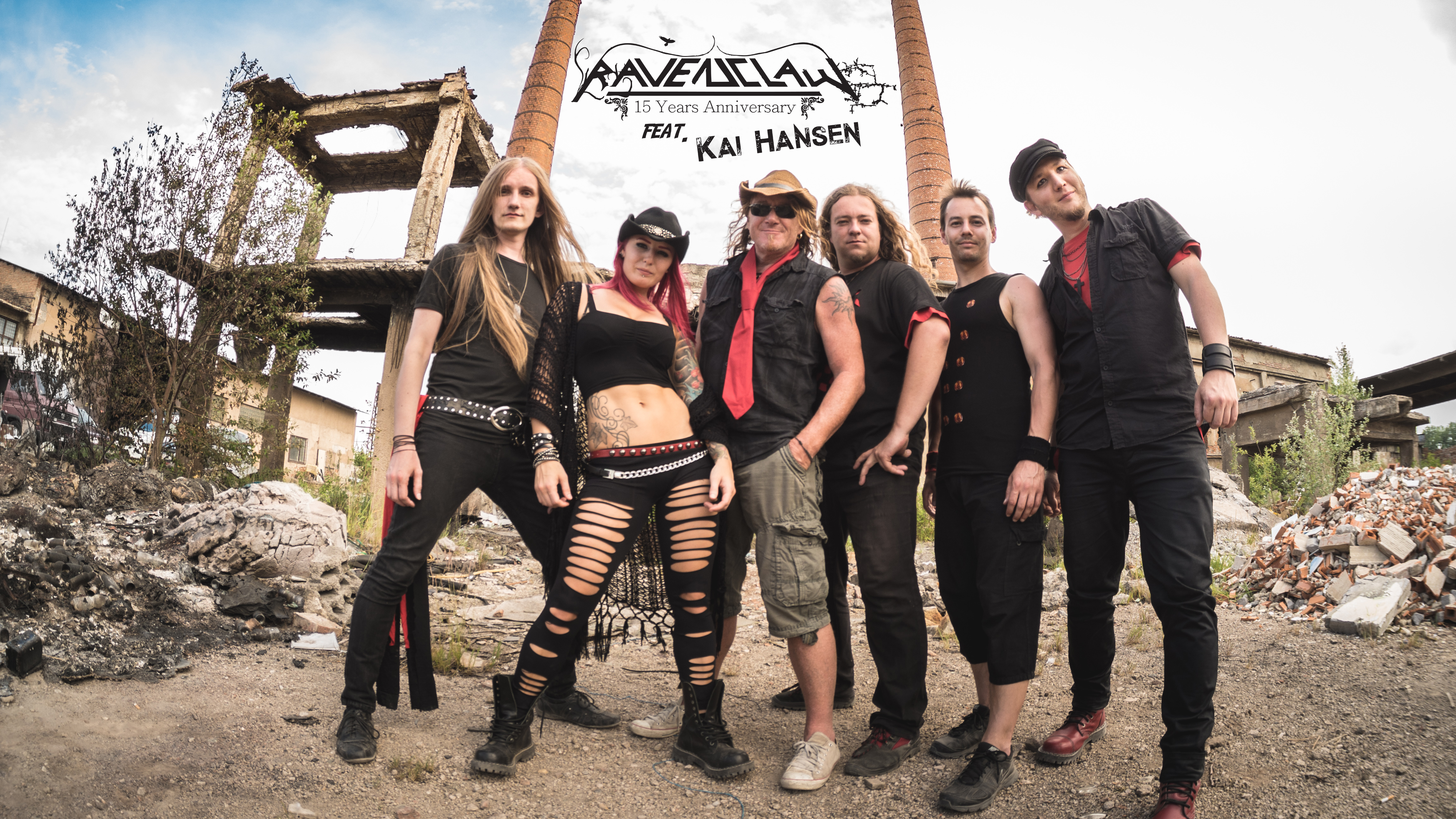 Promo fotografia ku spoločným koncertom s hosťom Kaiom Hansenom